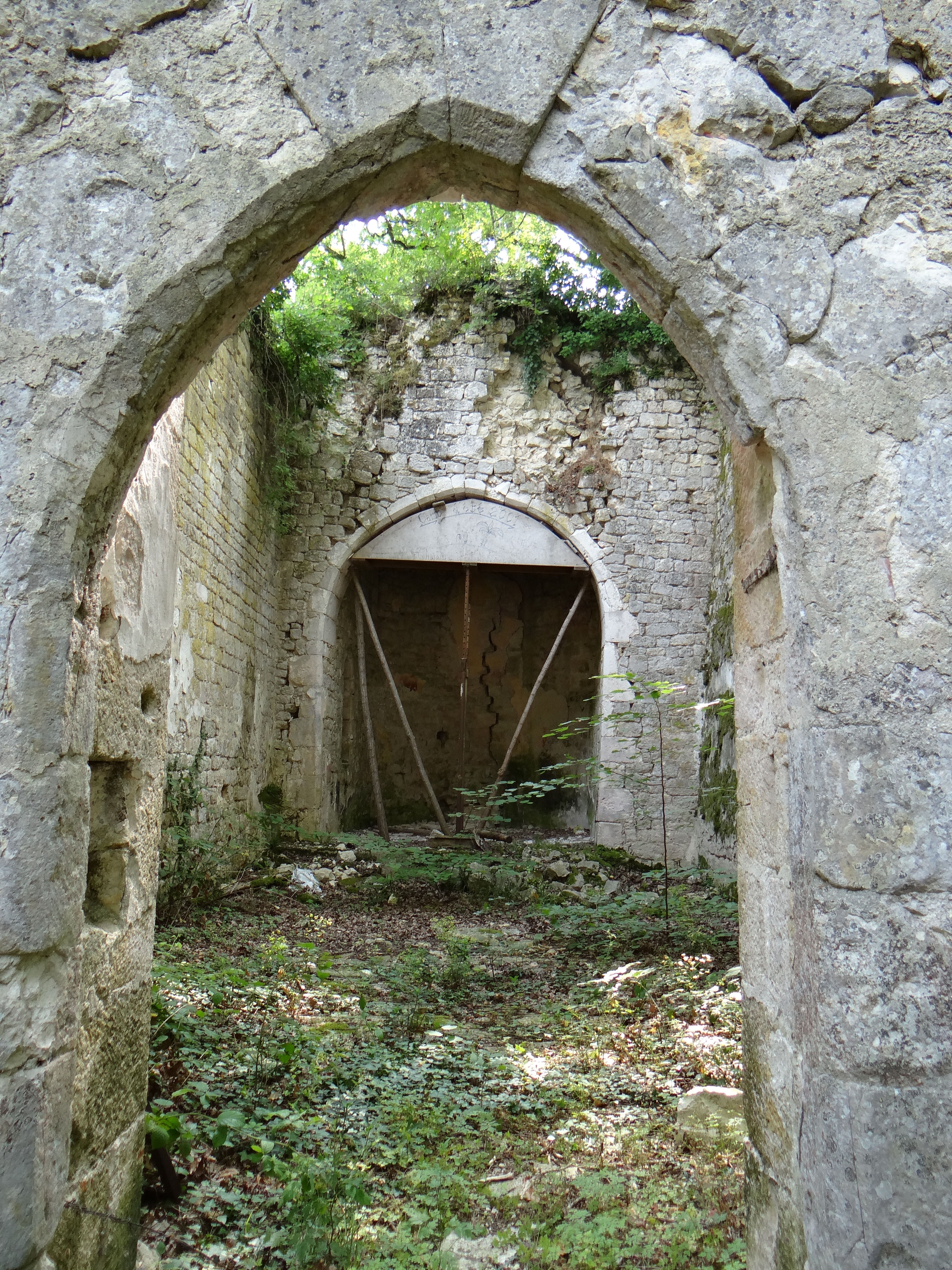 Bouloc-en-Quercy - Chapelle Saint-Caprais - Vue de la nef